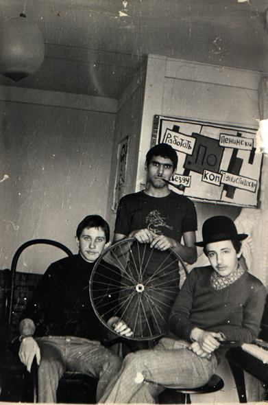 Владислав Протопопов, Авдей Тер-Оганьян, Максим Белозор. Фотография. Ростов-на-Дону, 1981 год.